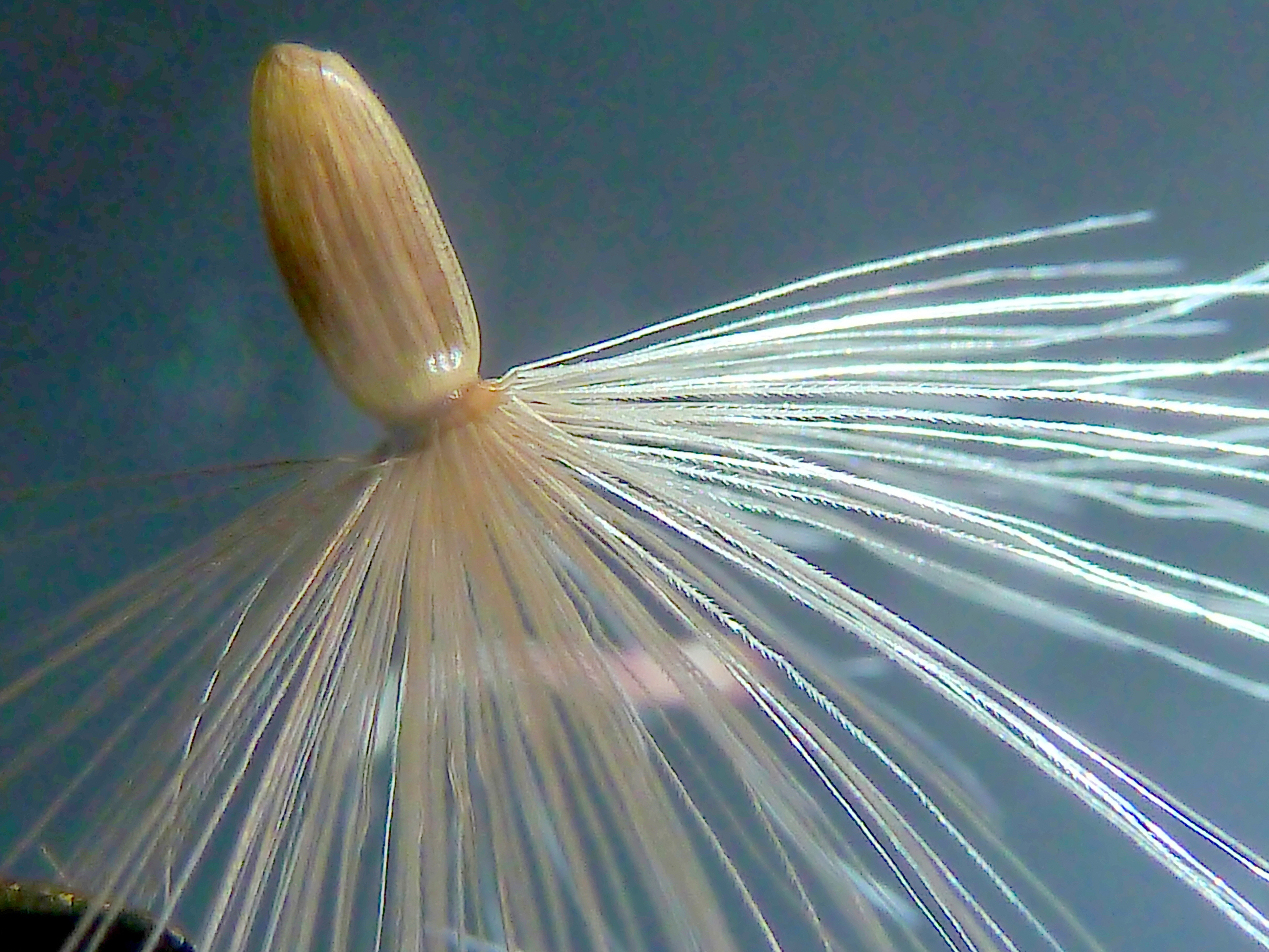 Carduus pycnocephalus (Cardo, cardo borriquero, cardo negro) - Cipsela suelta completa. Descampado circa Biblioteca, Albatera (Provincia de Alicante, España).